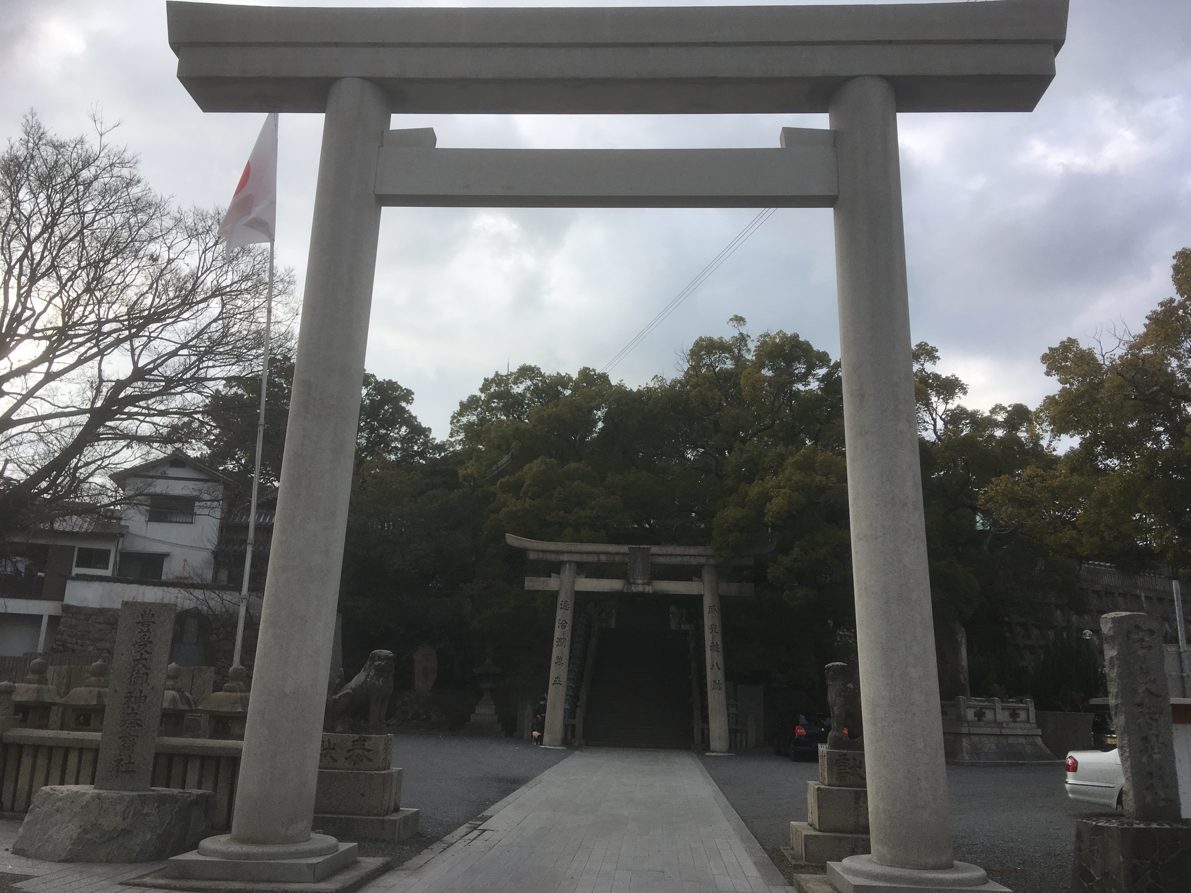 宇夫階神社の鳥居前からの撮影。2019年2月4日撮影。